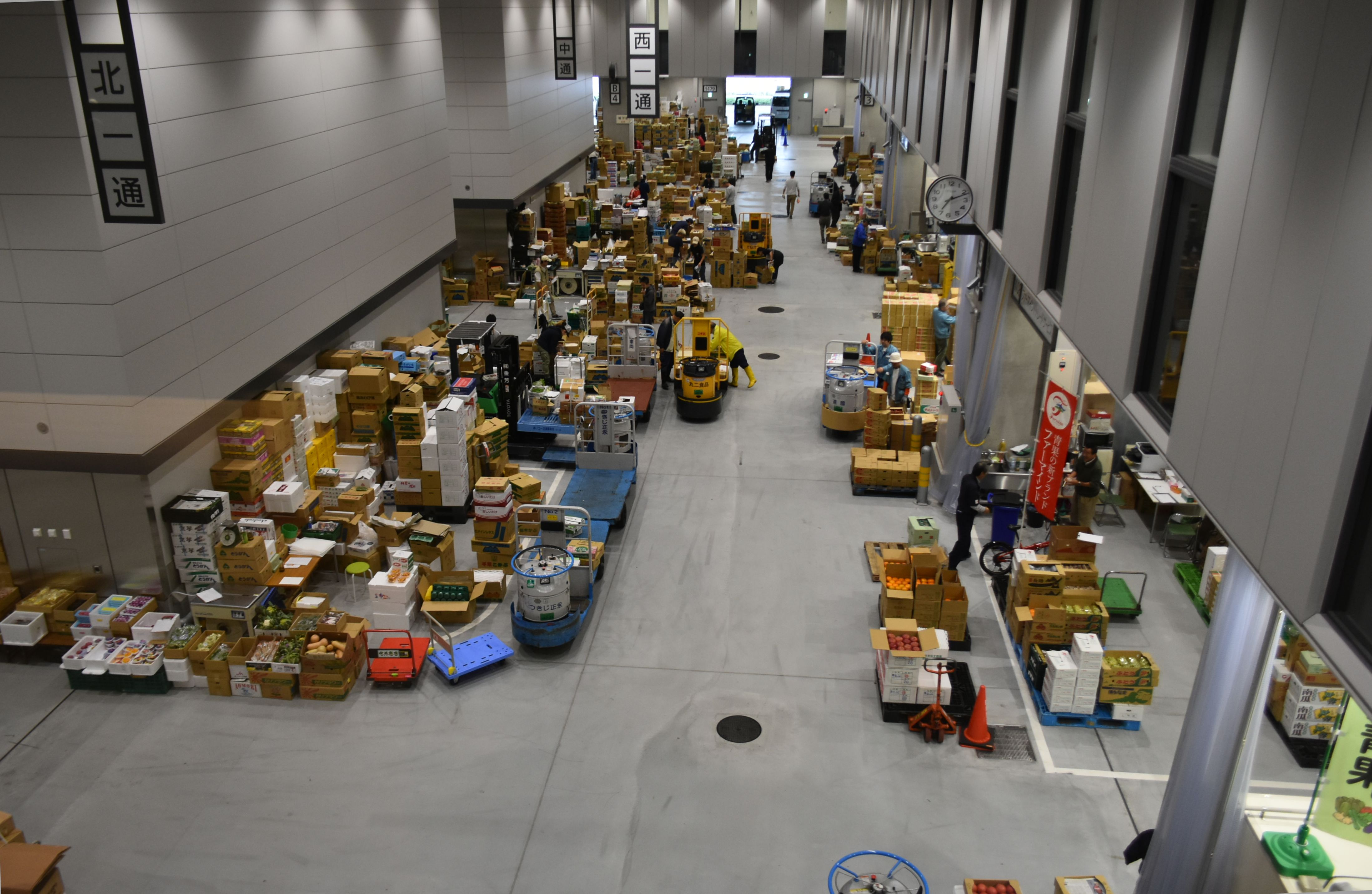 豊洲市場 青果棟